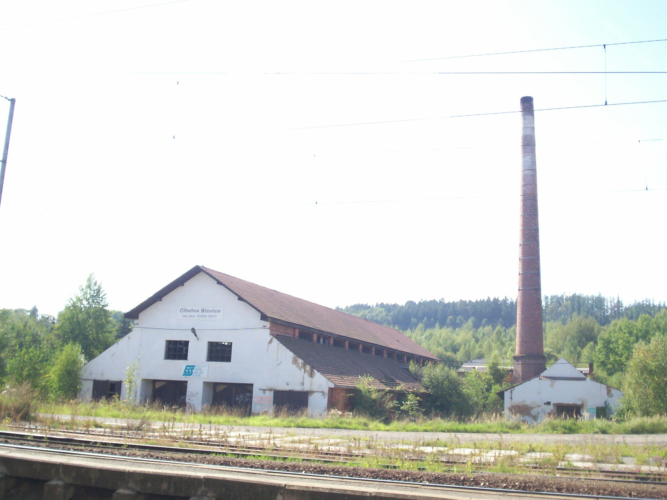 Blovická cihelna v žalostném stavu v roce 2010. Pohled od nádraží.